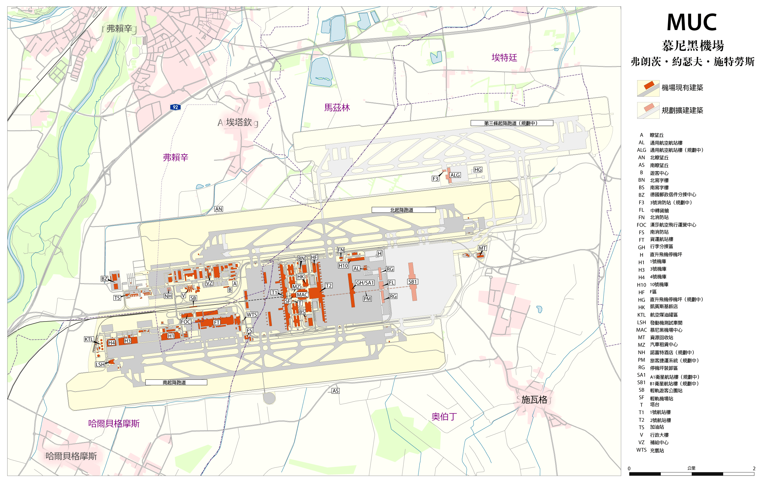 Karte vom Flughafen München inkl. geplanter Erweiterungen